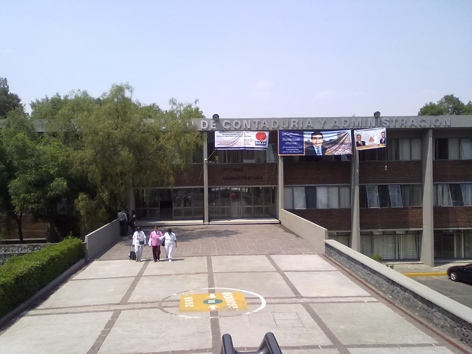 hermosa y majestuosa entrada prinicpal de la facultad de contaduria de administar